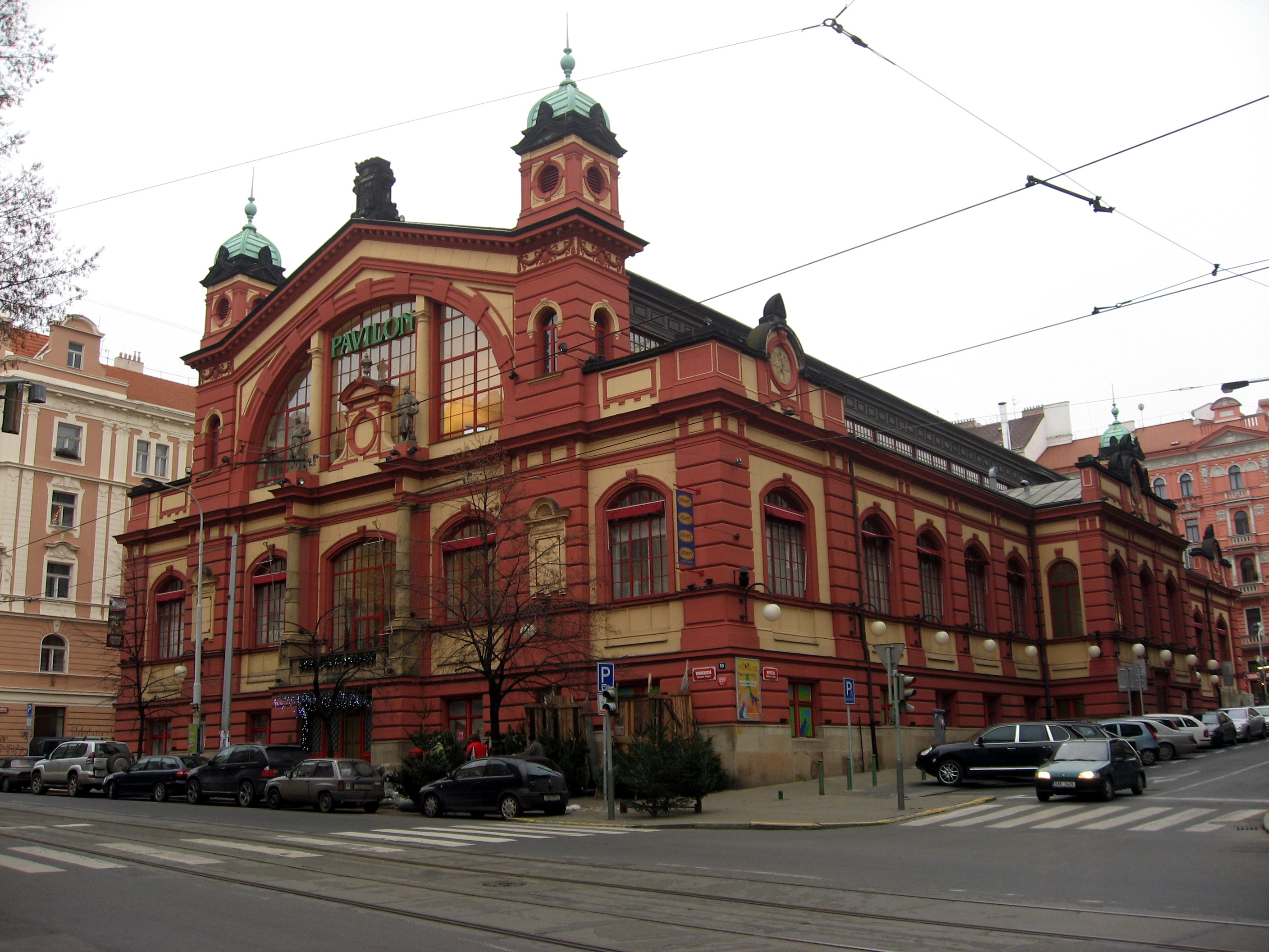 Vinohradská tržnice